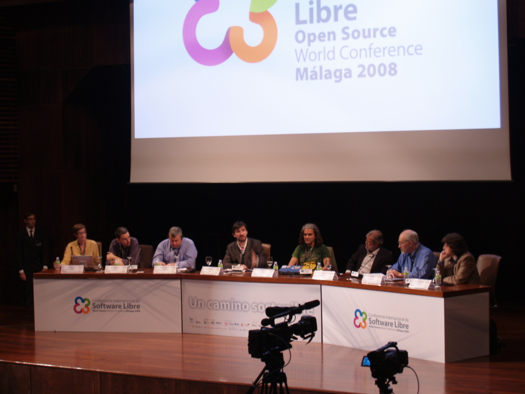 ¿Existe neutralidad tecnológica? ¿es posible la convivencia? Jo Walsh, Raúl Rivero, Tristan Nitot, Ignacio Escolar, Marcelo Branco, Juan Carlos Rodríguez Ibarra, Francis Pisani, Javier de la Cueva